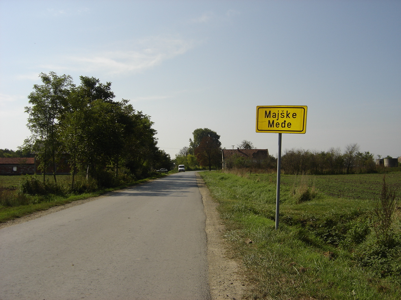 majške Međe, tabla na cesti L44030